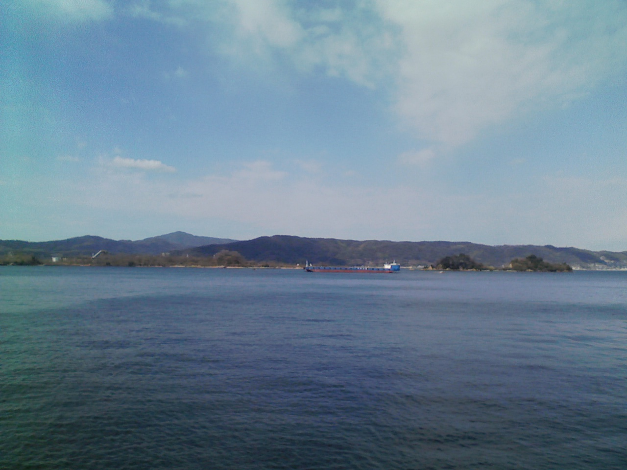 三つ子島（￥100,010,000）